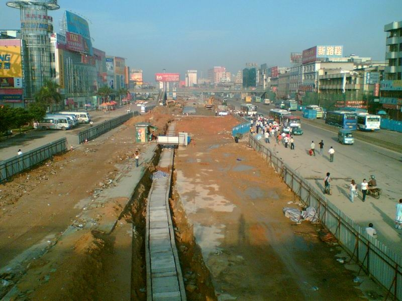 深圳地鐵3號線施工現場